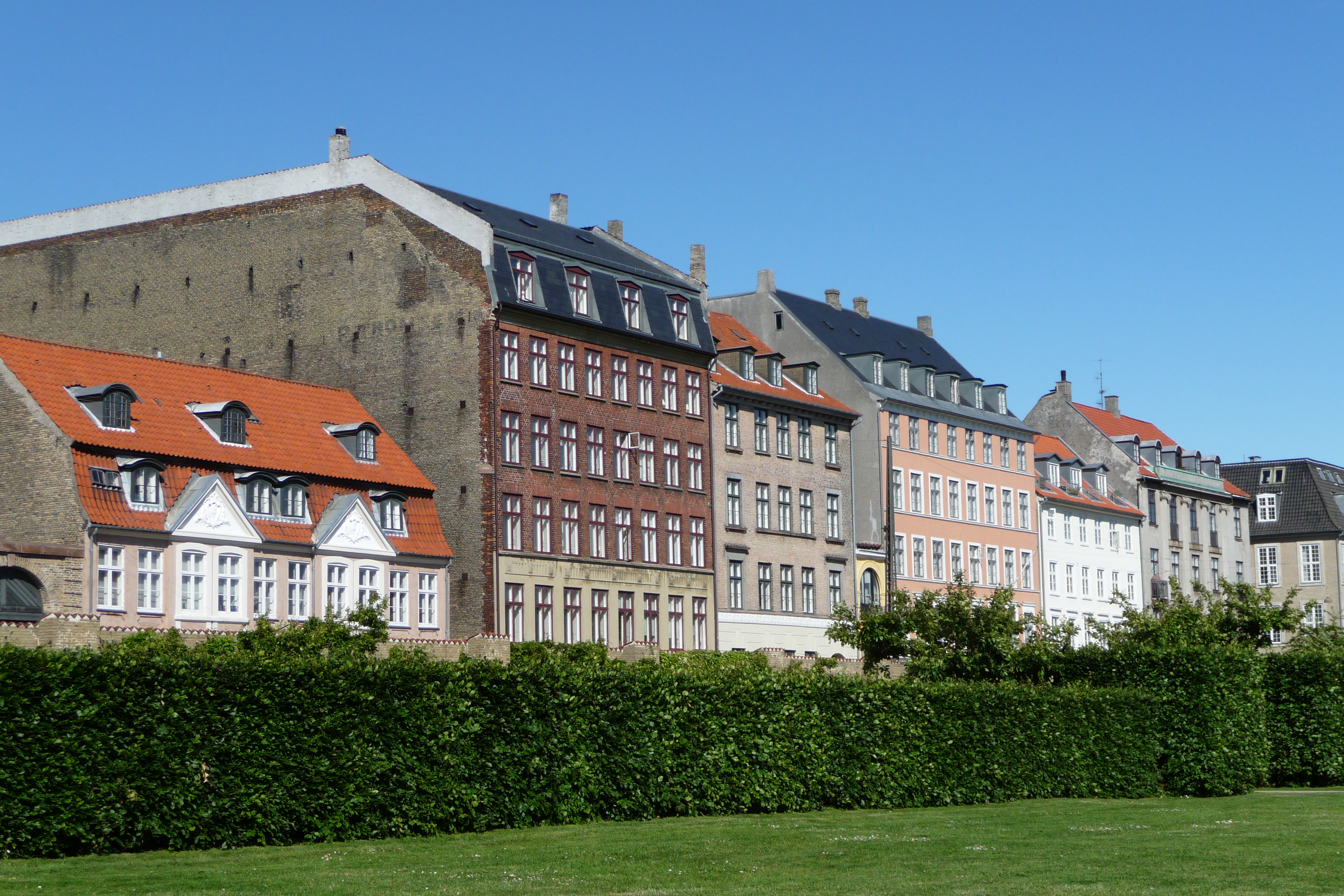 Sølvgade seen from Kongens Have in Copenhagen, Denmark